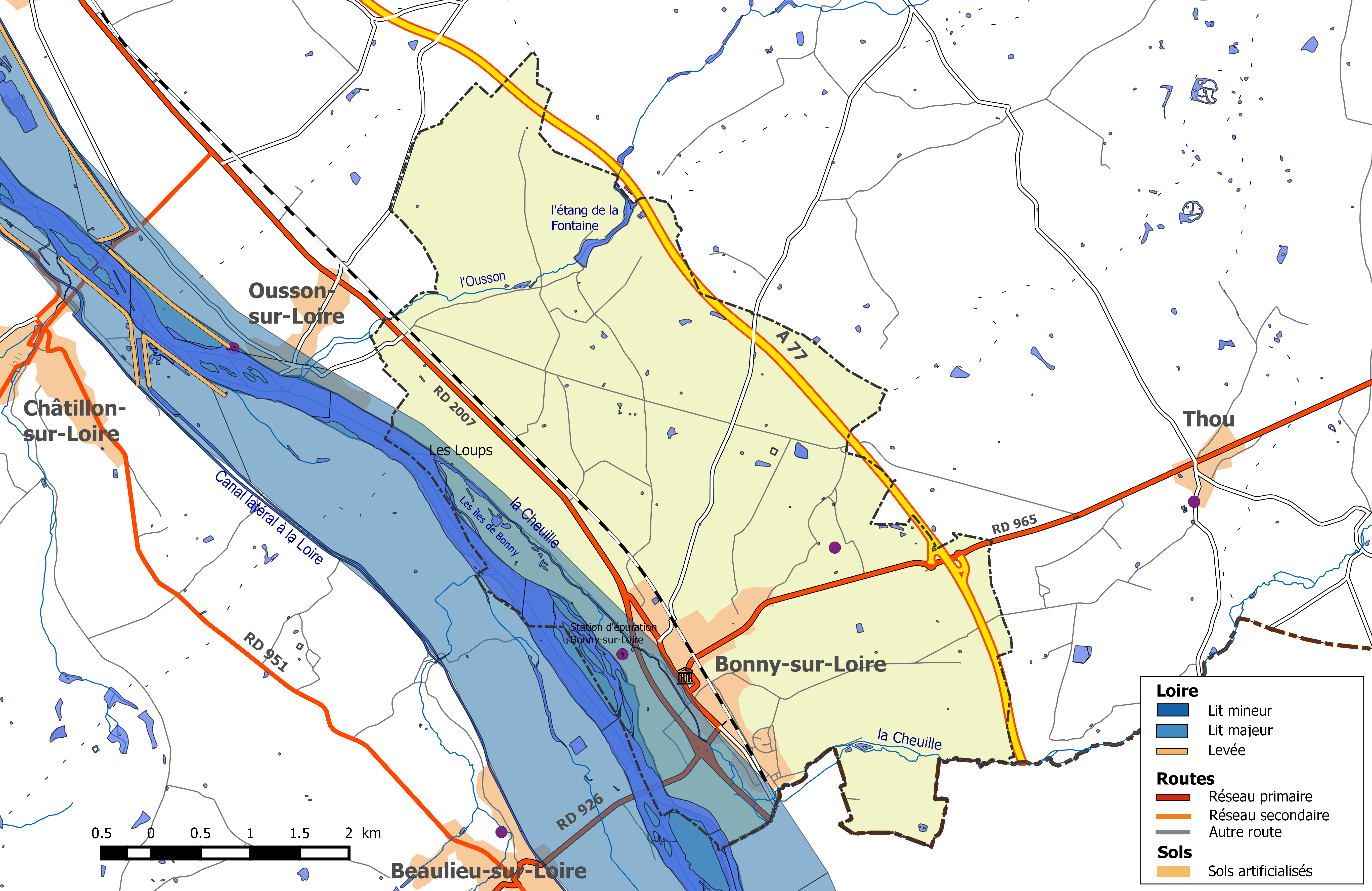 Zone inondable et réseaux hydrographique et routier de la commune de Bonny-sur-Loire